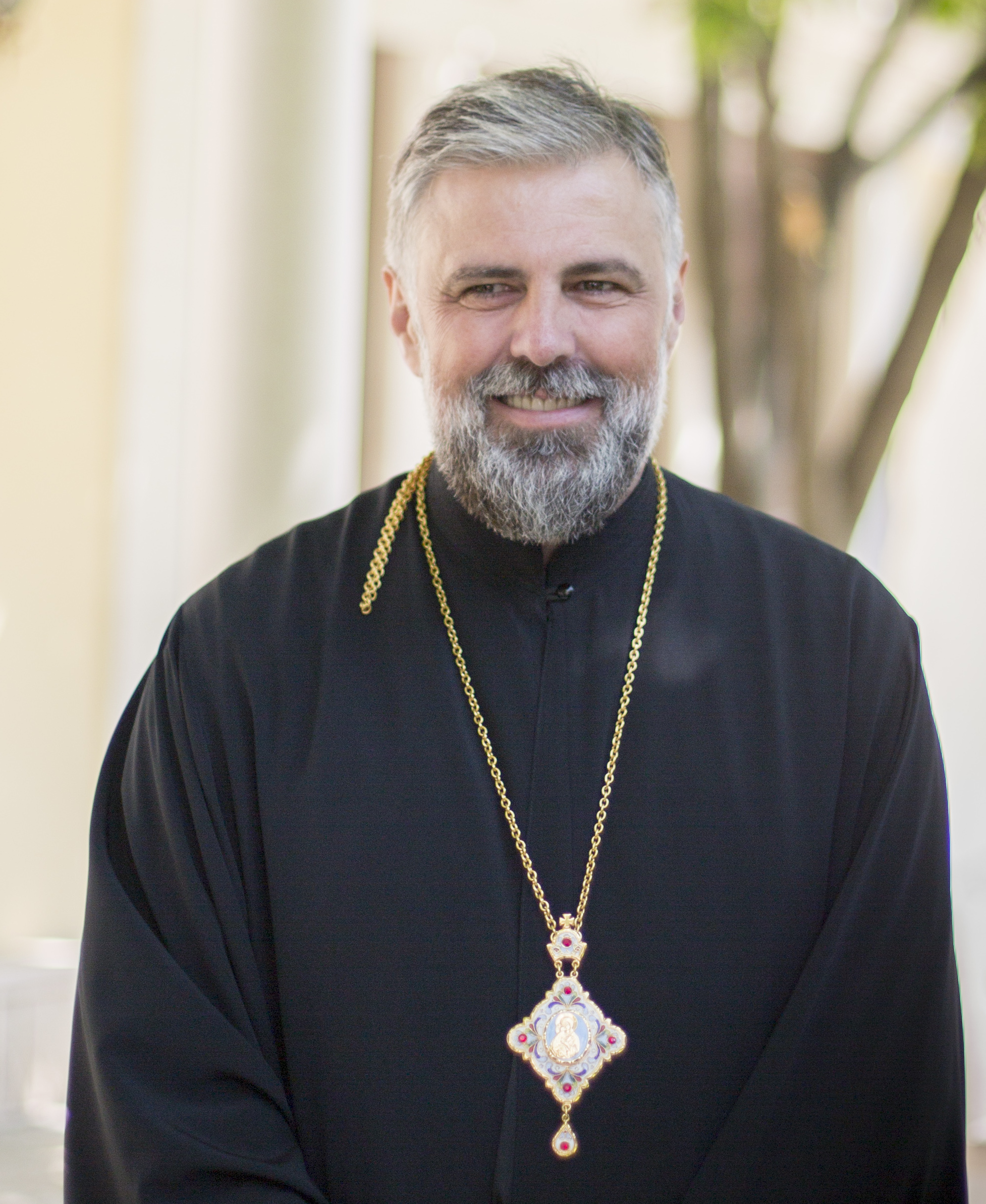 9 мая 2014, Захолмско-Герцеговинская епархия / 9 May 2014, Zachlumian-Herzegovinian Diocese